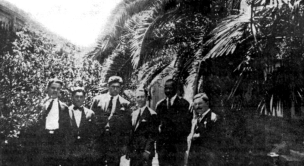 Luis Angel Firpo (tercero desde la izquierda) en 1921 en el patio del cine-bar "Rivadavia", ubicado frente a la plaza 25 de Mayo, en la ciudad de Junín, Argentina.